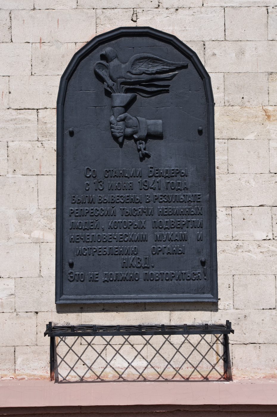 Табличка на ж/д вокзале Бендеры-1